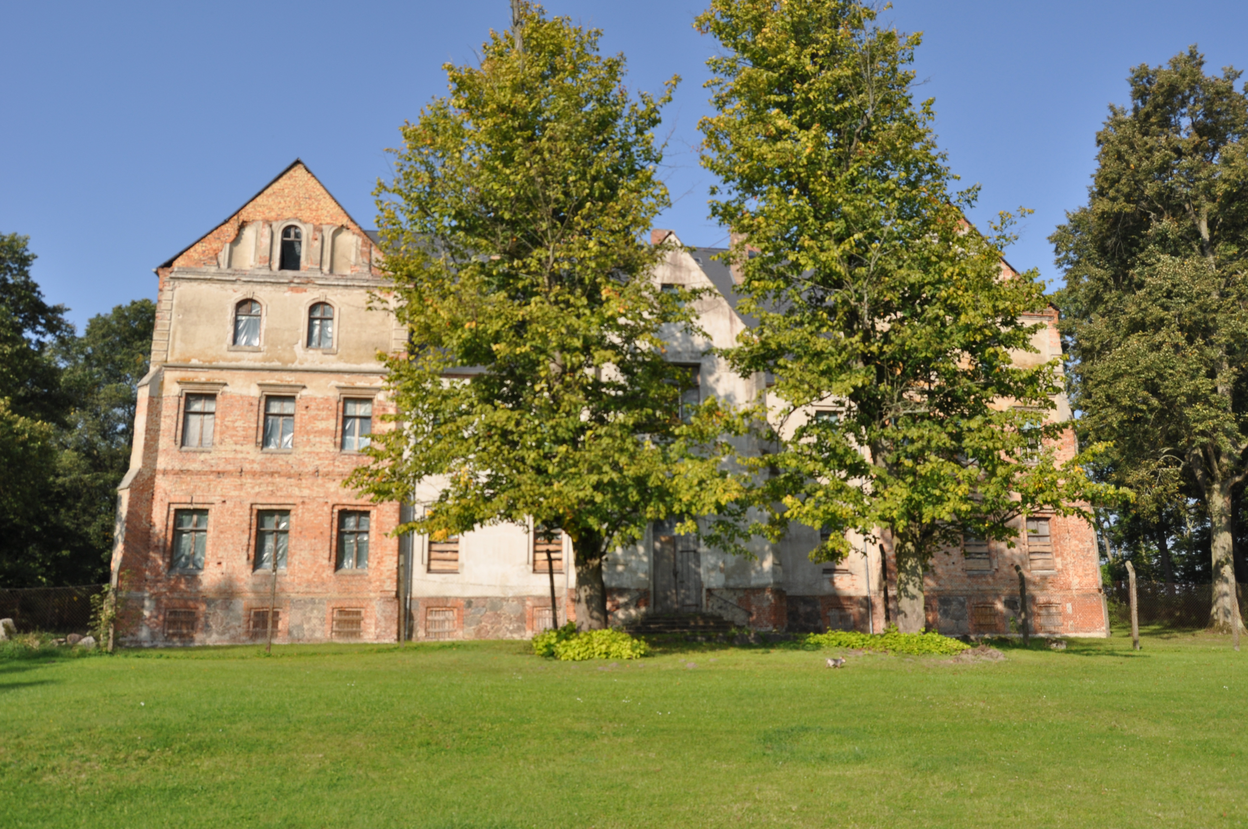 Schloss Lüssow 2014